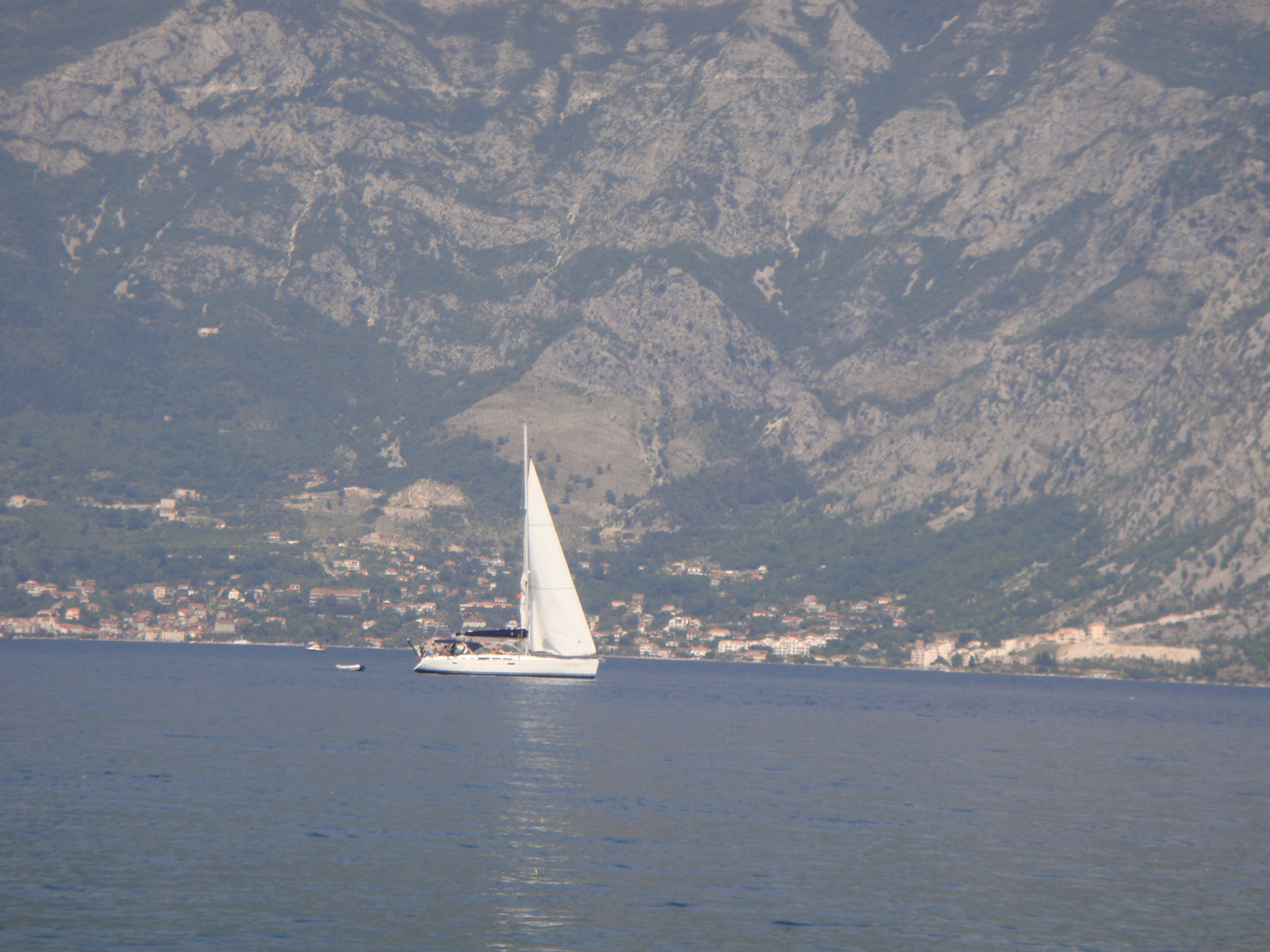 E65, Morinj, Montenegro